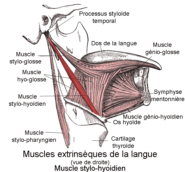 Muscle stylo-hyoïdien. Vue latérale . Anatomie humaine